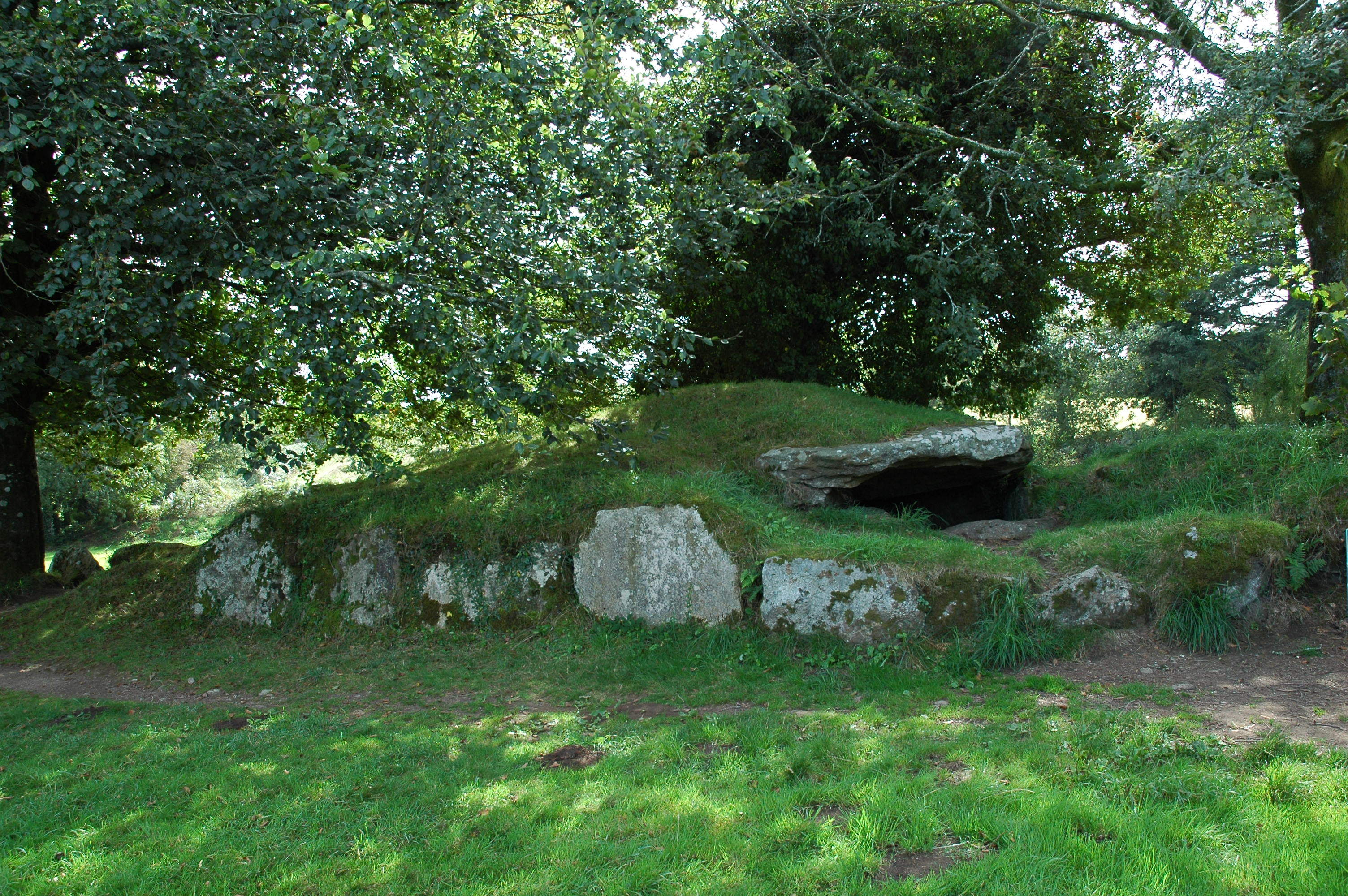 Dolmen Ti ar Boudiged à Brennilis, Finistère, France